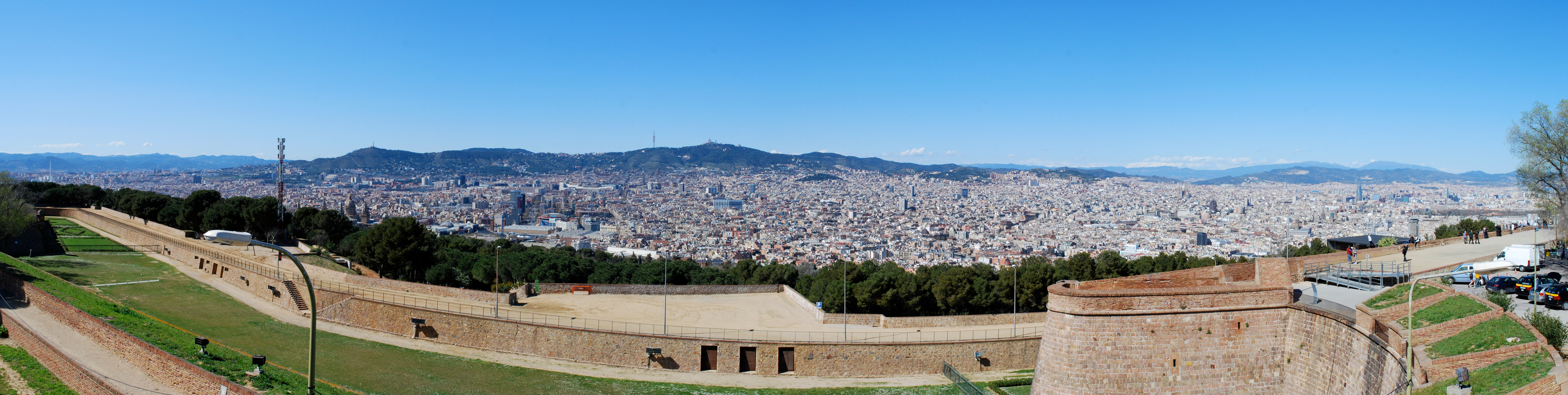 Panorama - Barcelona from Montjuïc.